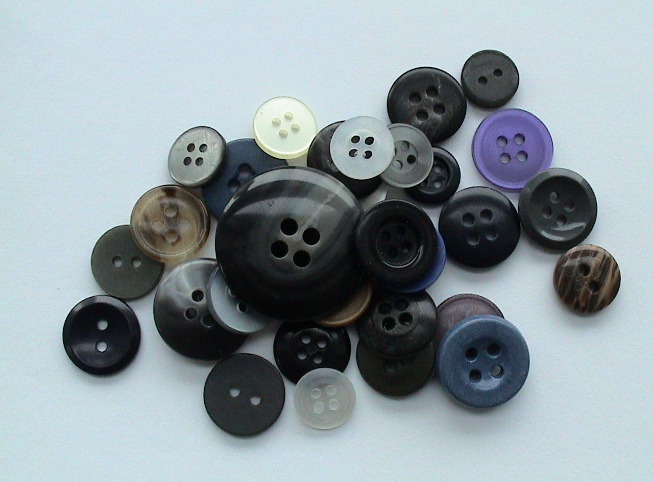 Verschiedene Köpfe